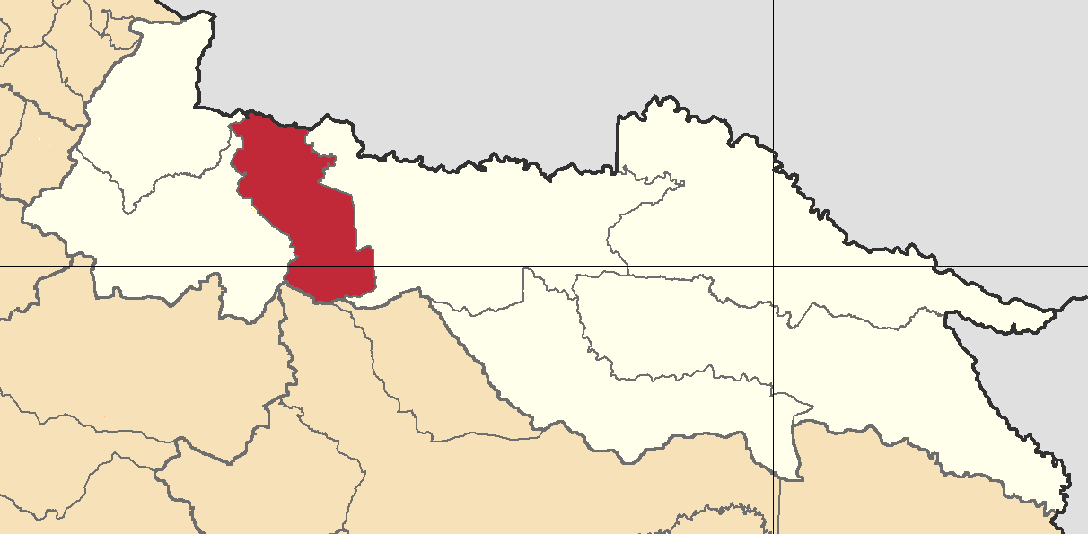 Mapa localizacor del cantón Cascales, Sucumbíos, Ecuador